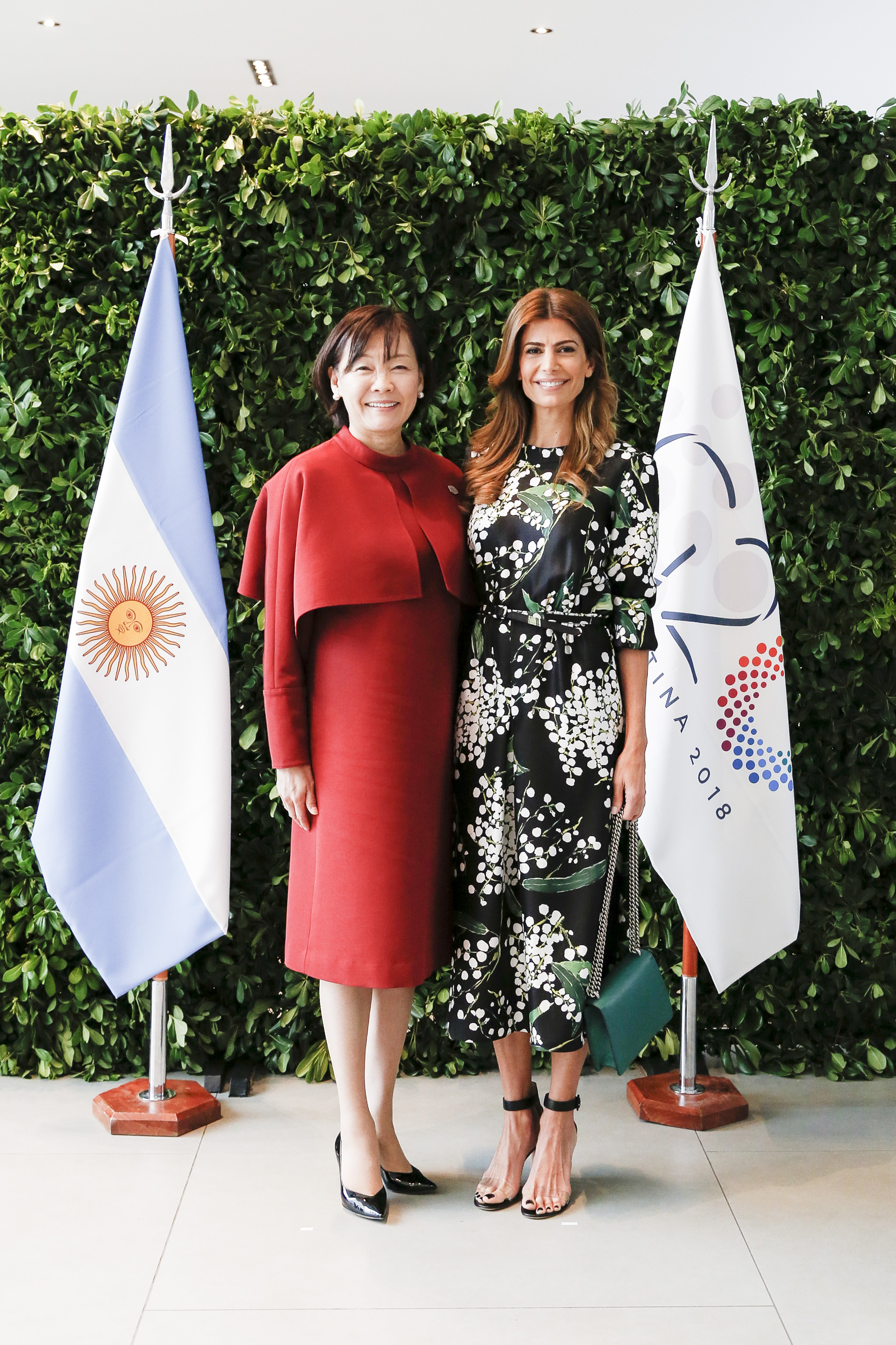 Partners Programme - Day 2